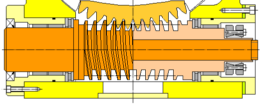 Systemerklärung spieleinstellung OTT Schraubgetriebe